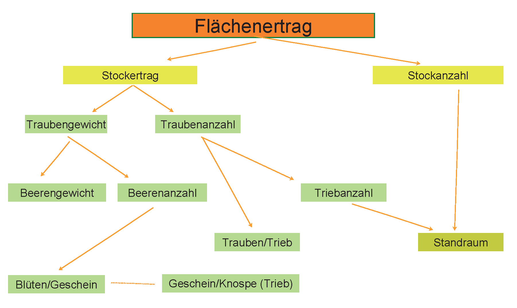 Ertragsstruktur der Weinrebe nach Alleweldt